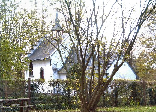 Limburgs: Kloes op de Sjaatsberg